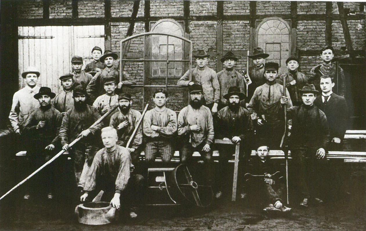 Sensenschmiede der Fa. Cronenberg 1894